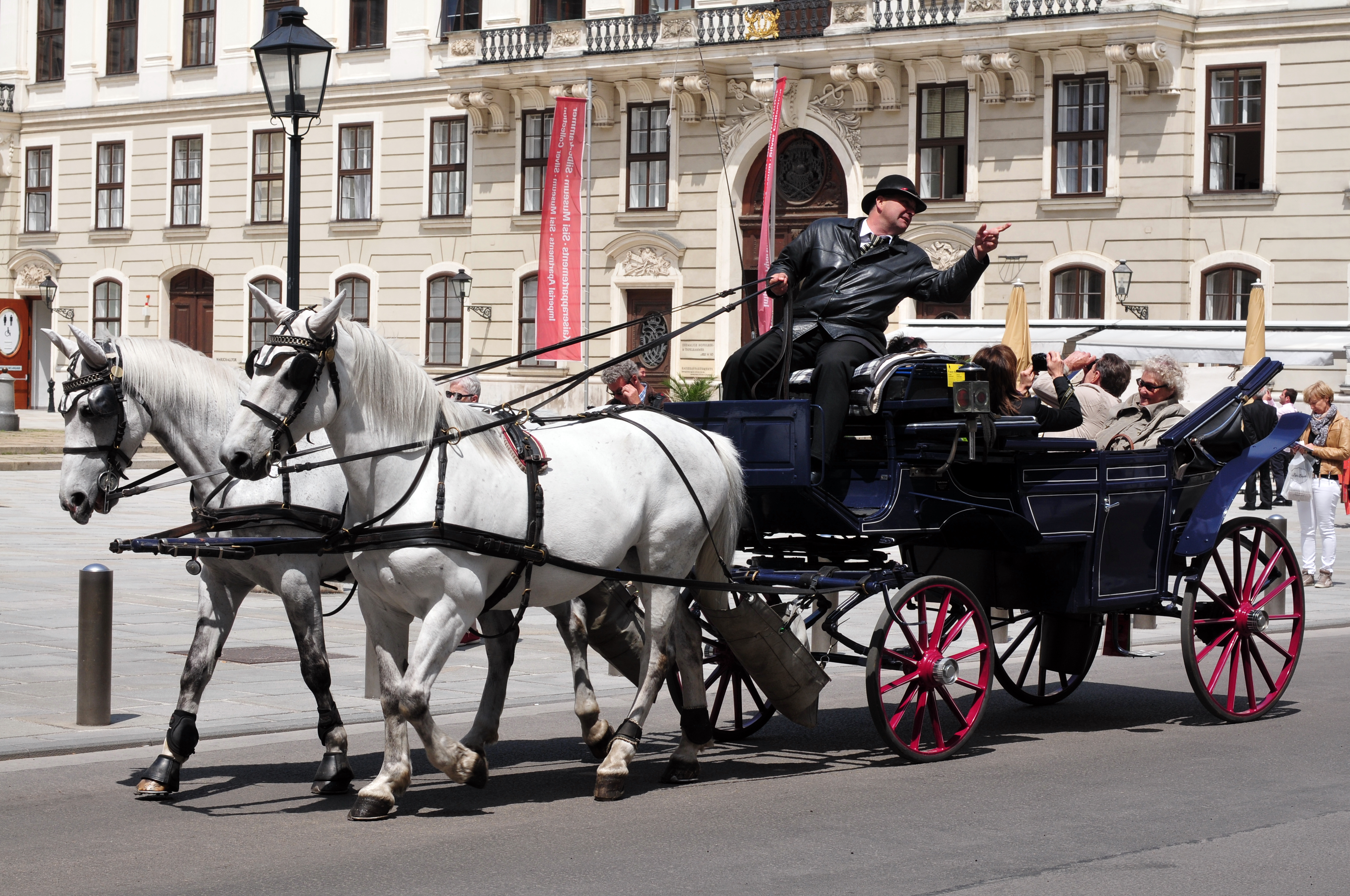 Wien